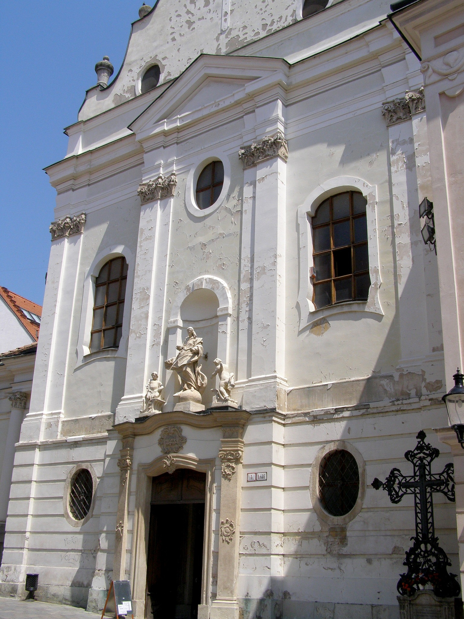 Priečelie kostola This medium shows the protected monument with the number 101-24/2 in the Slovak Republic.